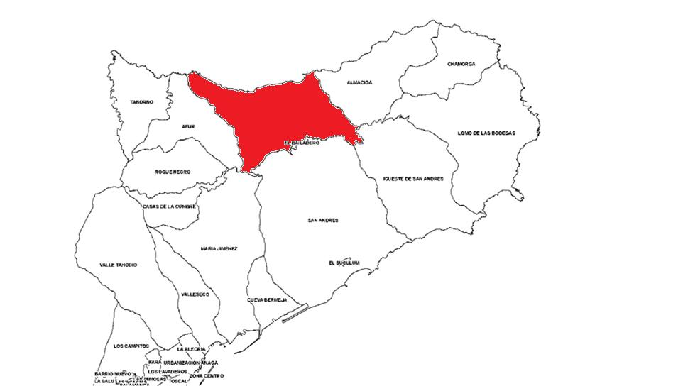 Localización de Taganana